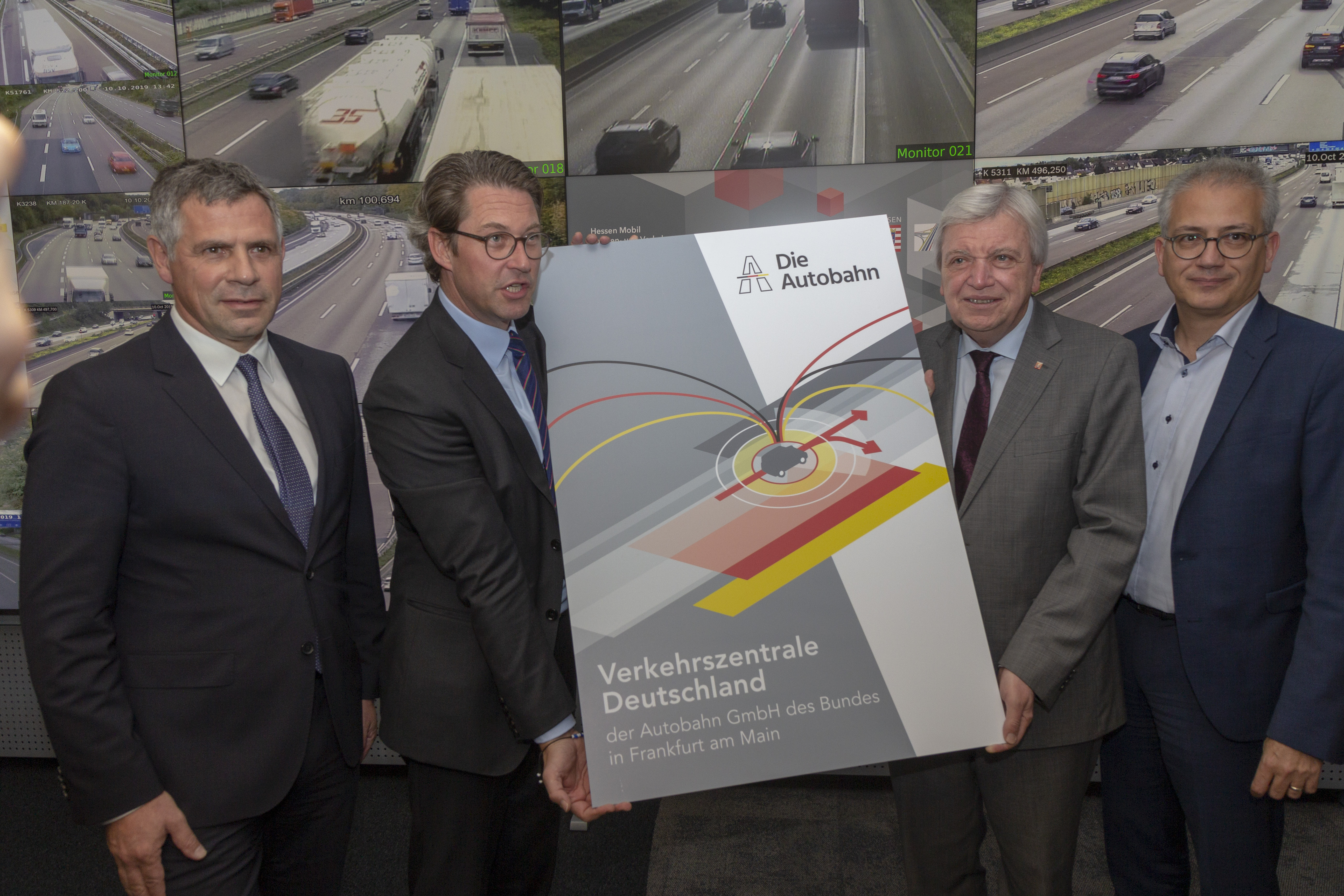 Einweihung der Verkehrszentrale Deutschland der Autobahn GmbH des Bundes am 10. Oktober 2019 in Frankfurt am Main.